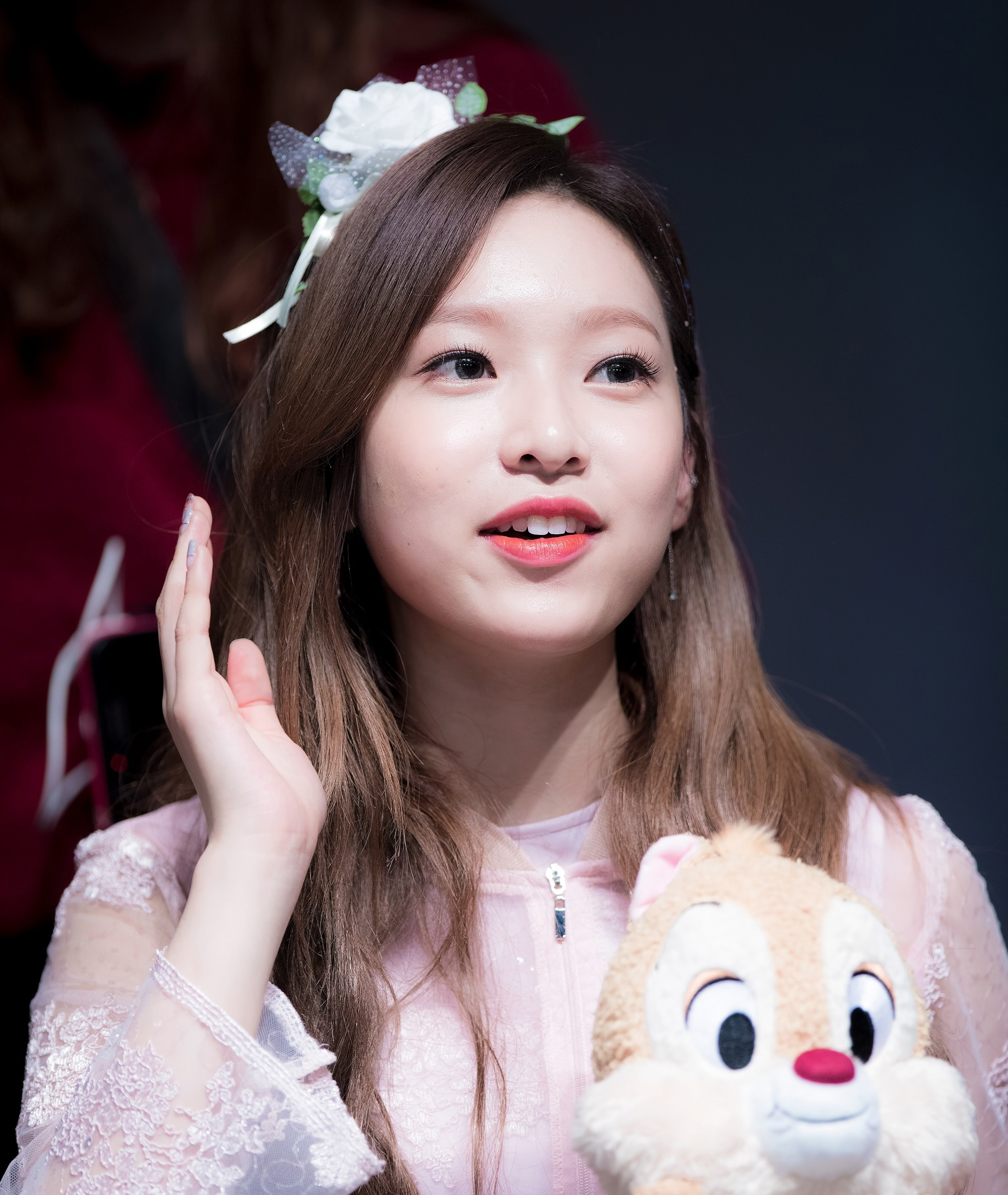 170121 강남 APRIL 팬싸인회 예나 3Pic